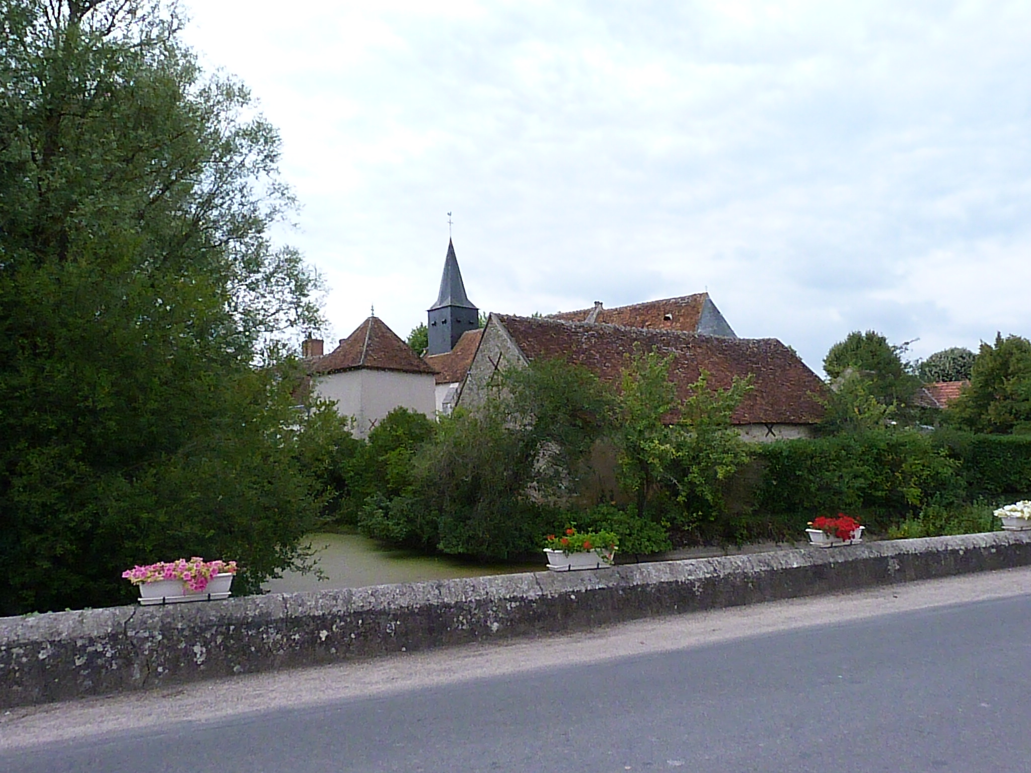 Eglise de Sassay vue du pont.